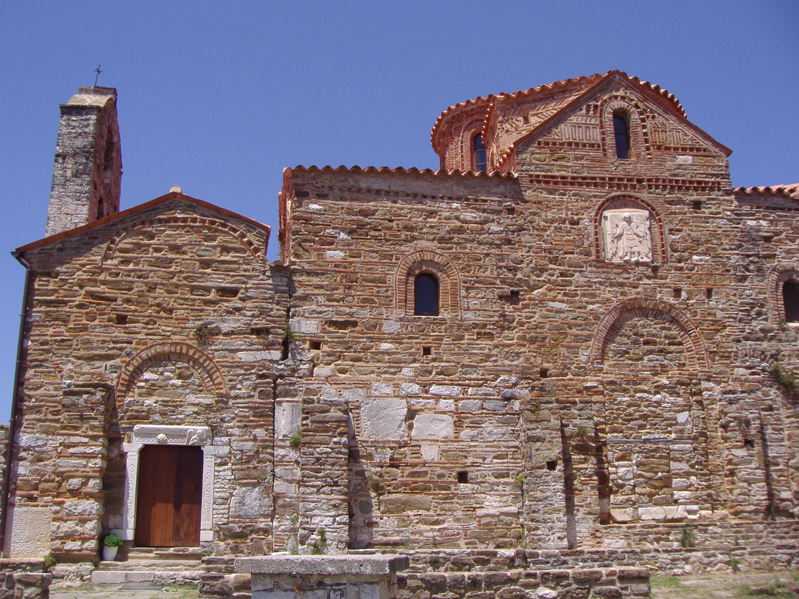 PANAGIA VLAHERNON CHURCH